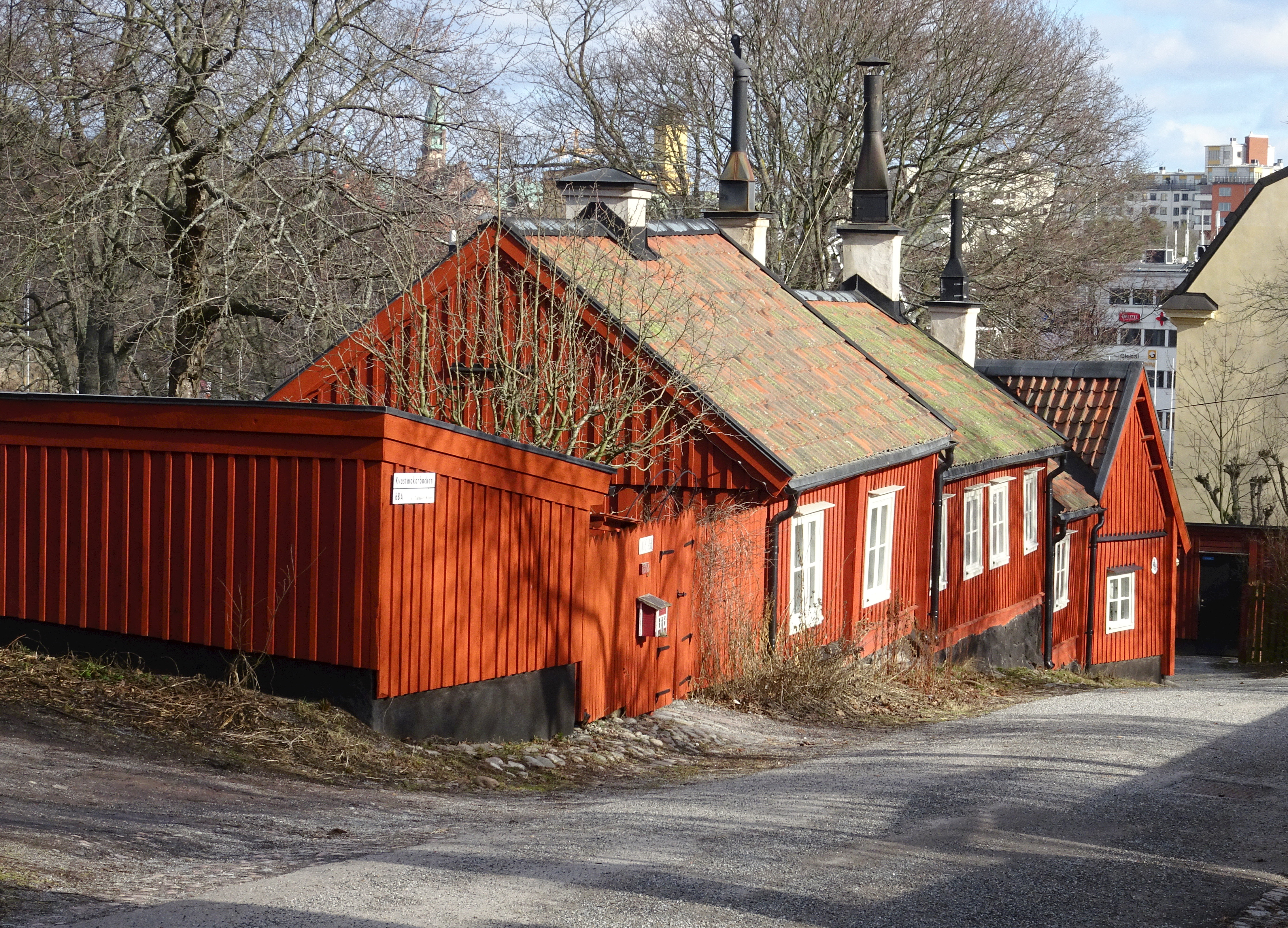 Kvastmakarbacken